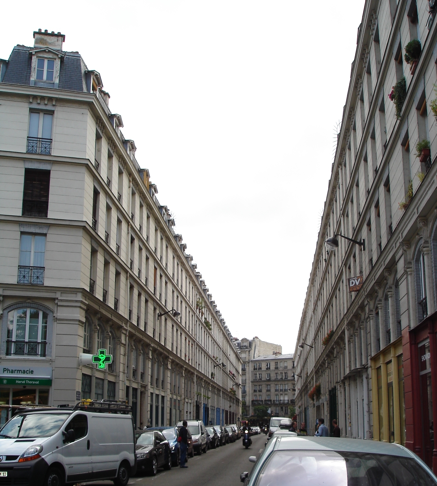 Rue des Immeubles-Industriels -near Place de la Nation in Paris- General view